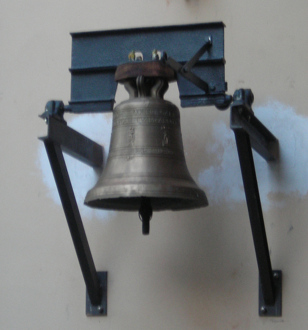 La campana di richiamo del Santuario di Saronno (VA)